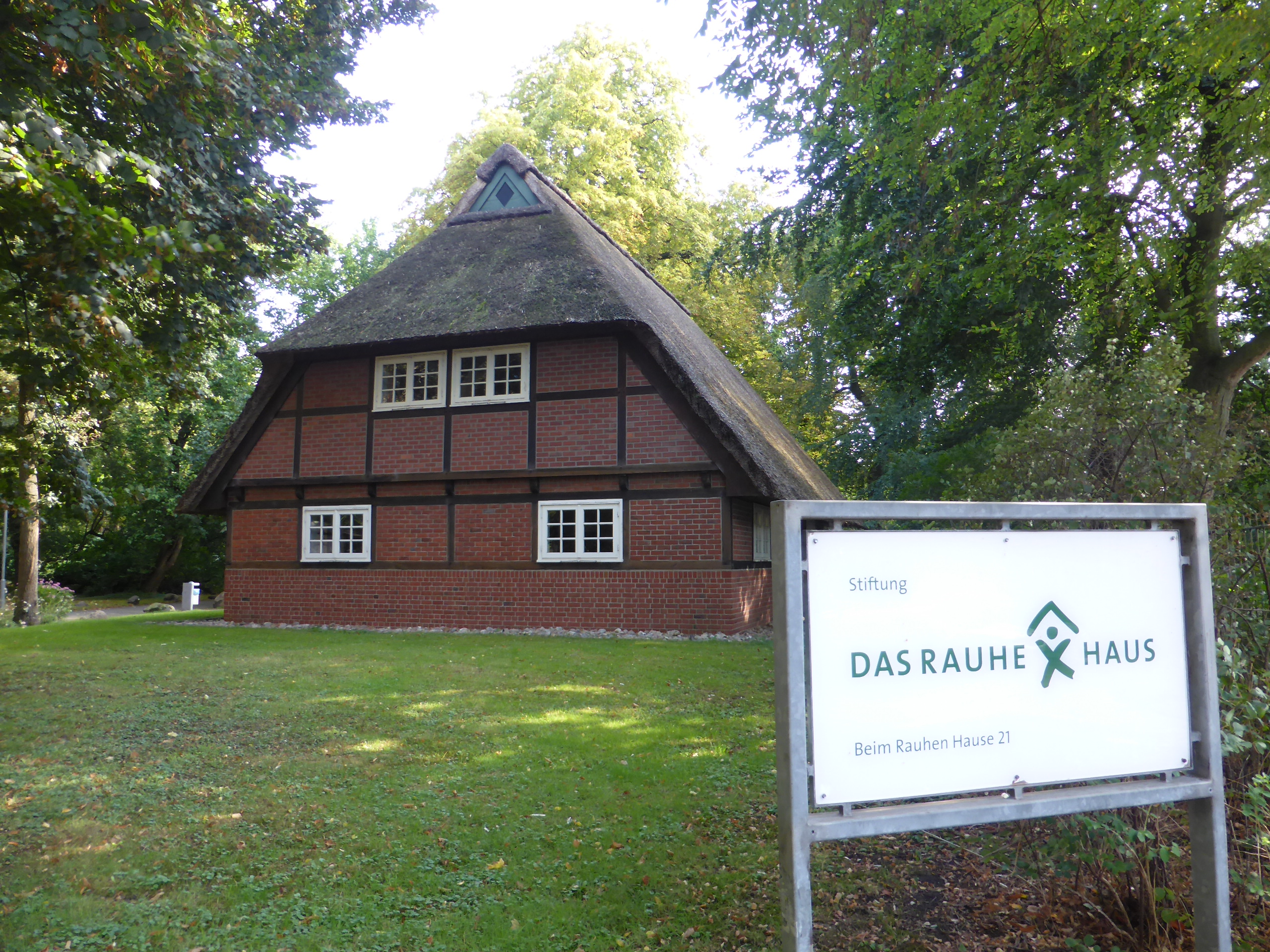 Die kriegszerstörte Kate erhielt in den 1980er Jahren einen teilweise als Museum eingerichteten Nachbau